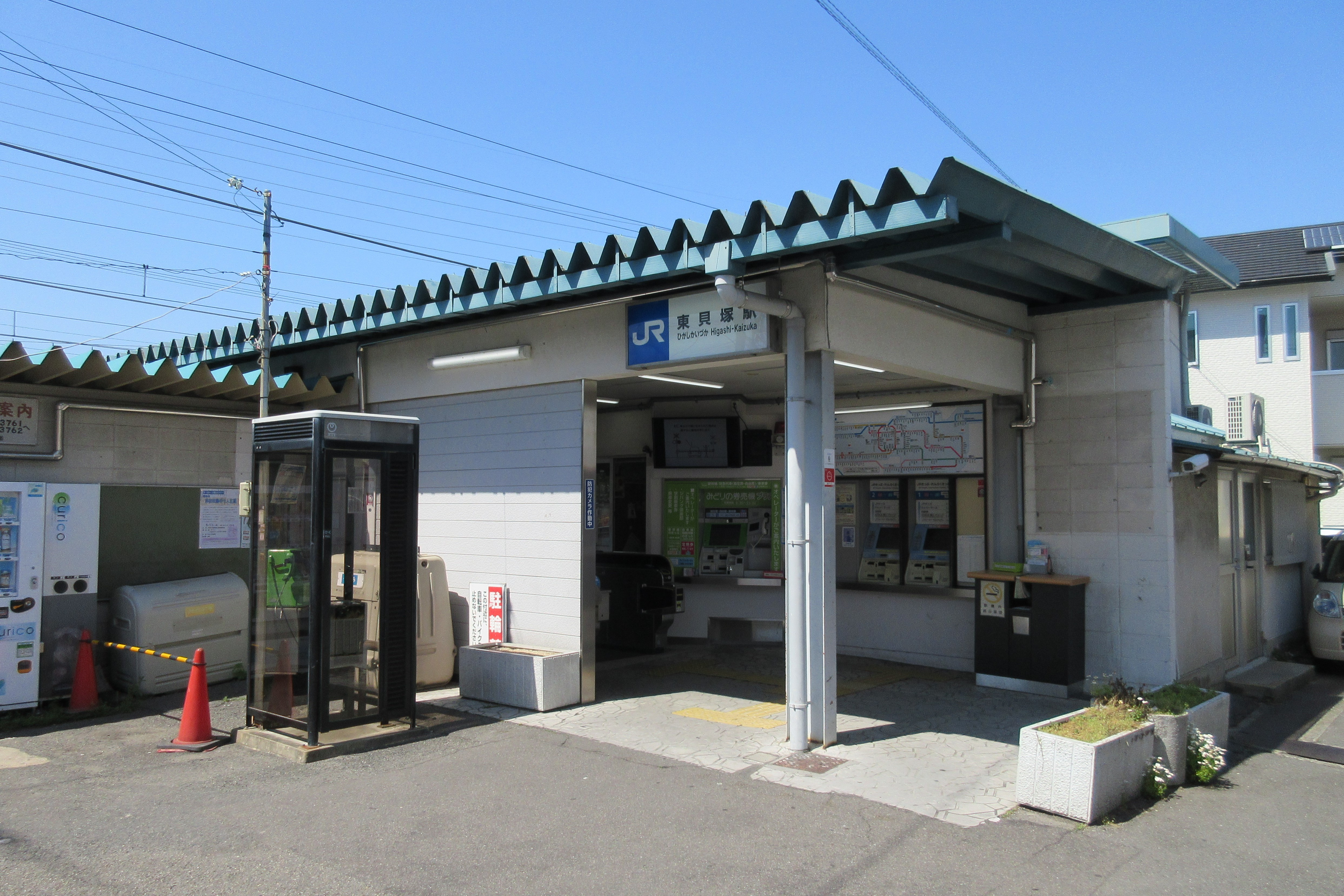 JR東貝塚駅